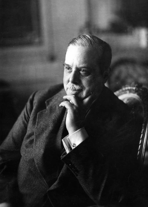 Luca Orsini Baroni Der neue italienische Botschafter Orsini Baroni. 41855-29 [Porträt von Luca Orsini Baroni] Abgebildete Personen: Orsini Baroni, Luca: Botschafter in Deutschland, Italien (GND 117147540) Information added by Wikimedia users.*